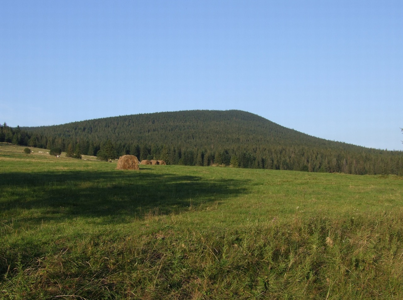 Widok z dolnej części Doliny Cichej Orawskiej na Magurę Witowską